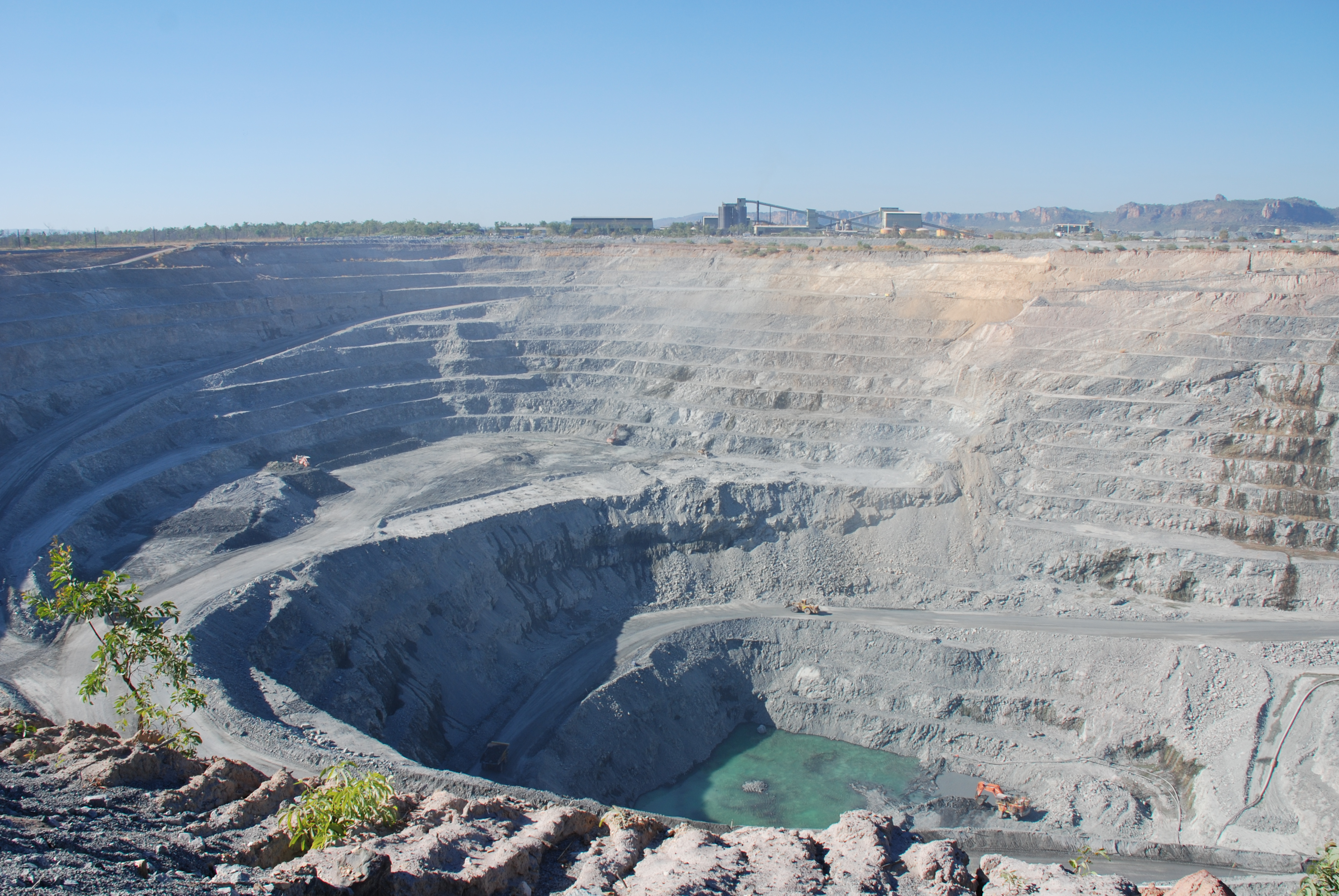 Kakadu National Park uranium mining